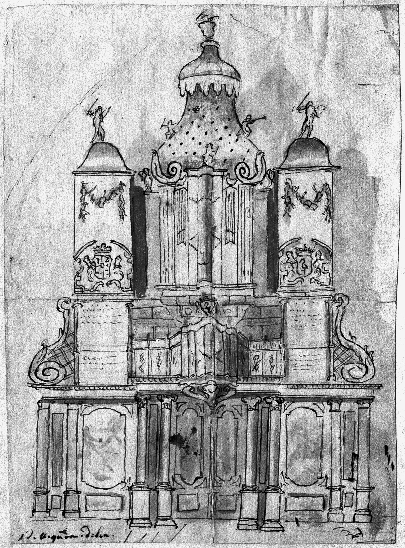 Oude orgel Grote Kerk in 1770, Den Haag, in 1767 vernieuwd, afgeboken in 1881